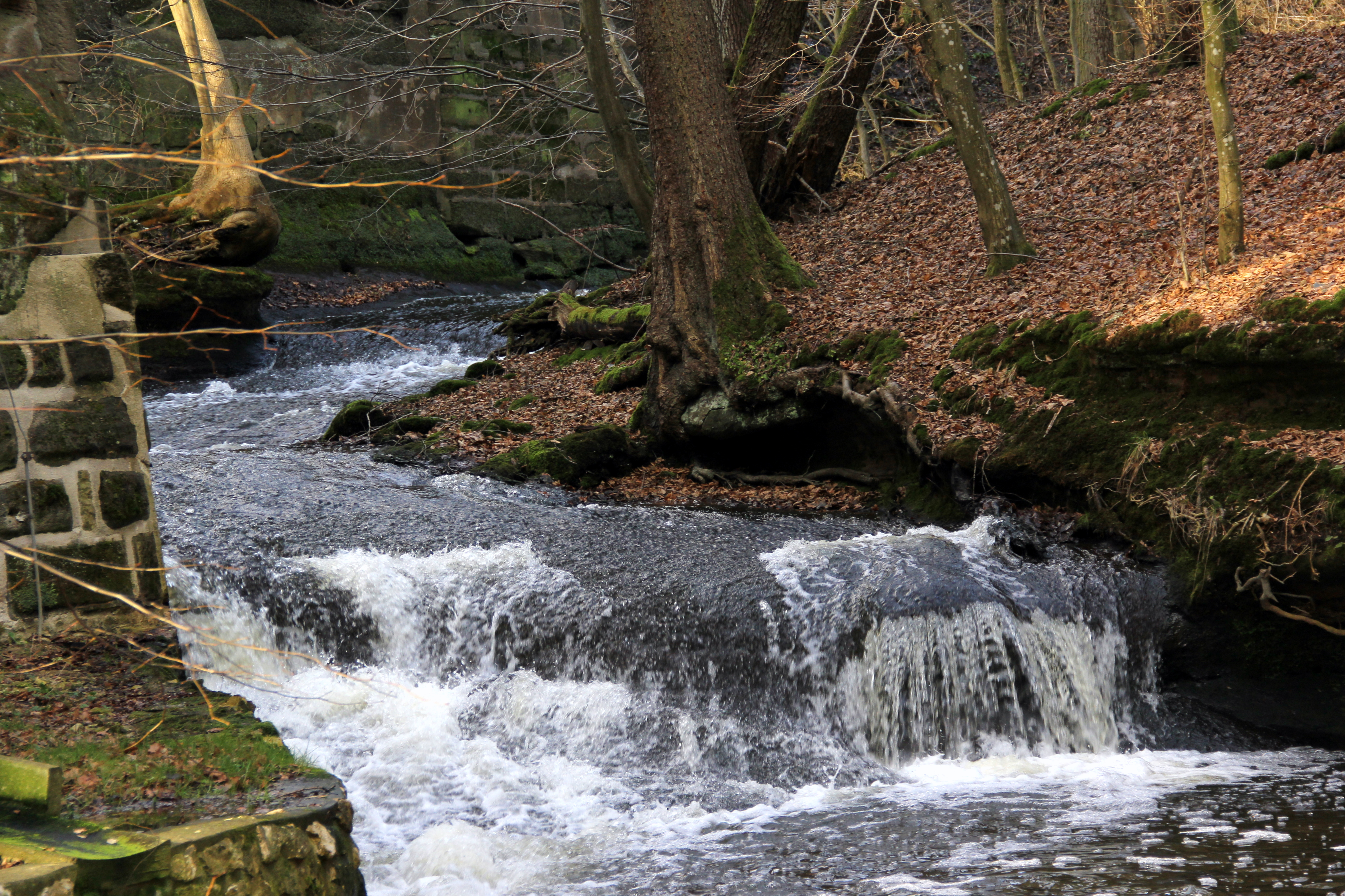 Schloss Kugelhammer, Röthenbach bei St. Wolfgang, Gauchsbach